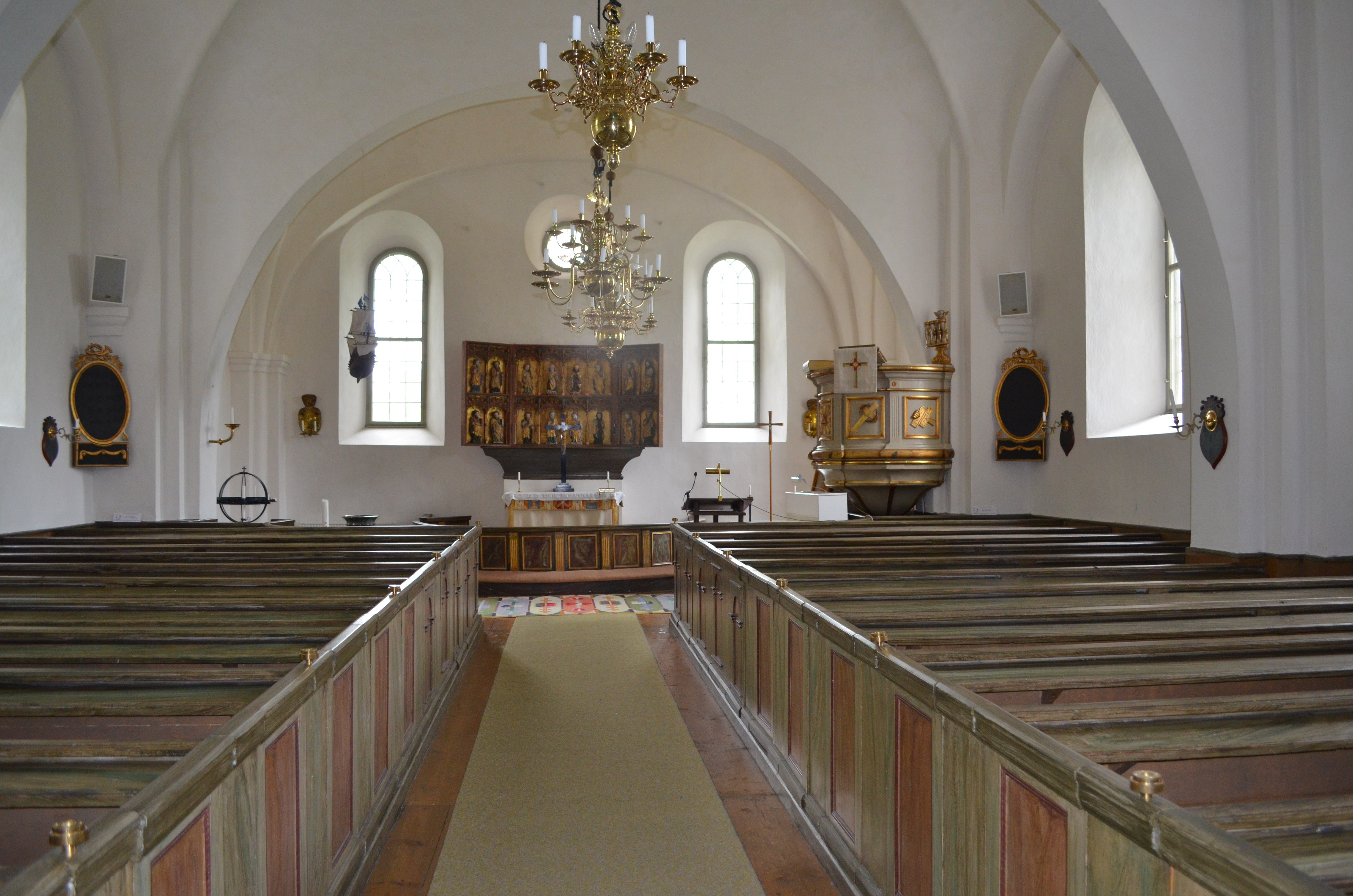 Kyrksalen 2018